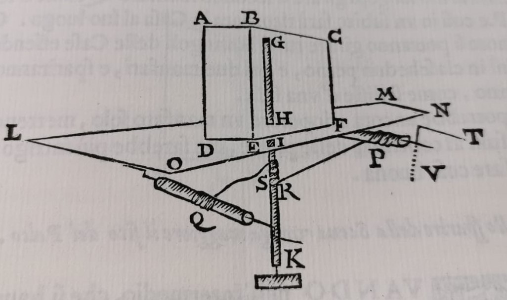 Hier sieht man eine Skizze einem Portcullis von Nicola Sabbatini.